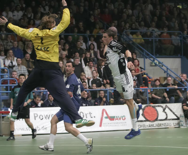 Marcus Rominger, Torwart des TV Großwallstadt, am 30. Dezember 2006 im Spiel gegen den THW Kiel in der Aschaffenburger Unterfrankenhalle. Es wirft Dominik Klein vom THW Kiel.